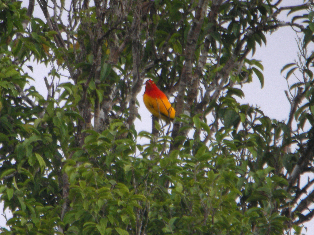 Flame Bowerbird, Sericulus aureus